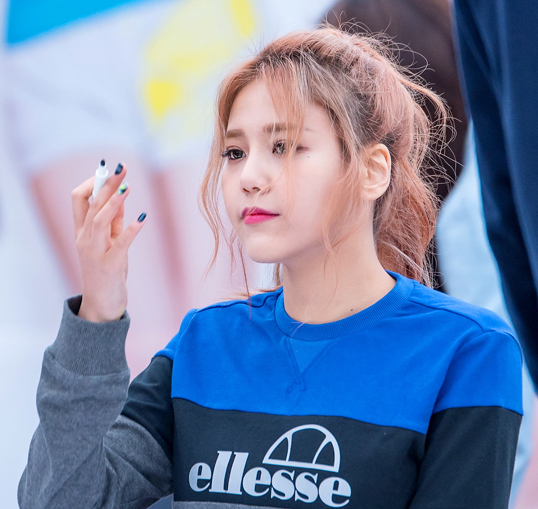 [16.04.08] AOA 엘레쎄 수원 팬싸인회